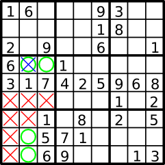 Udelukkelse ved at at et tal kun kan stå i en række eller kolonne et andet sted i "skemaet"